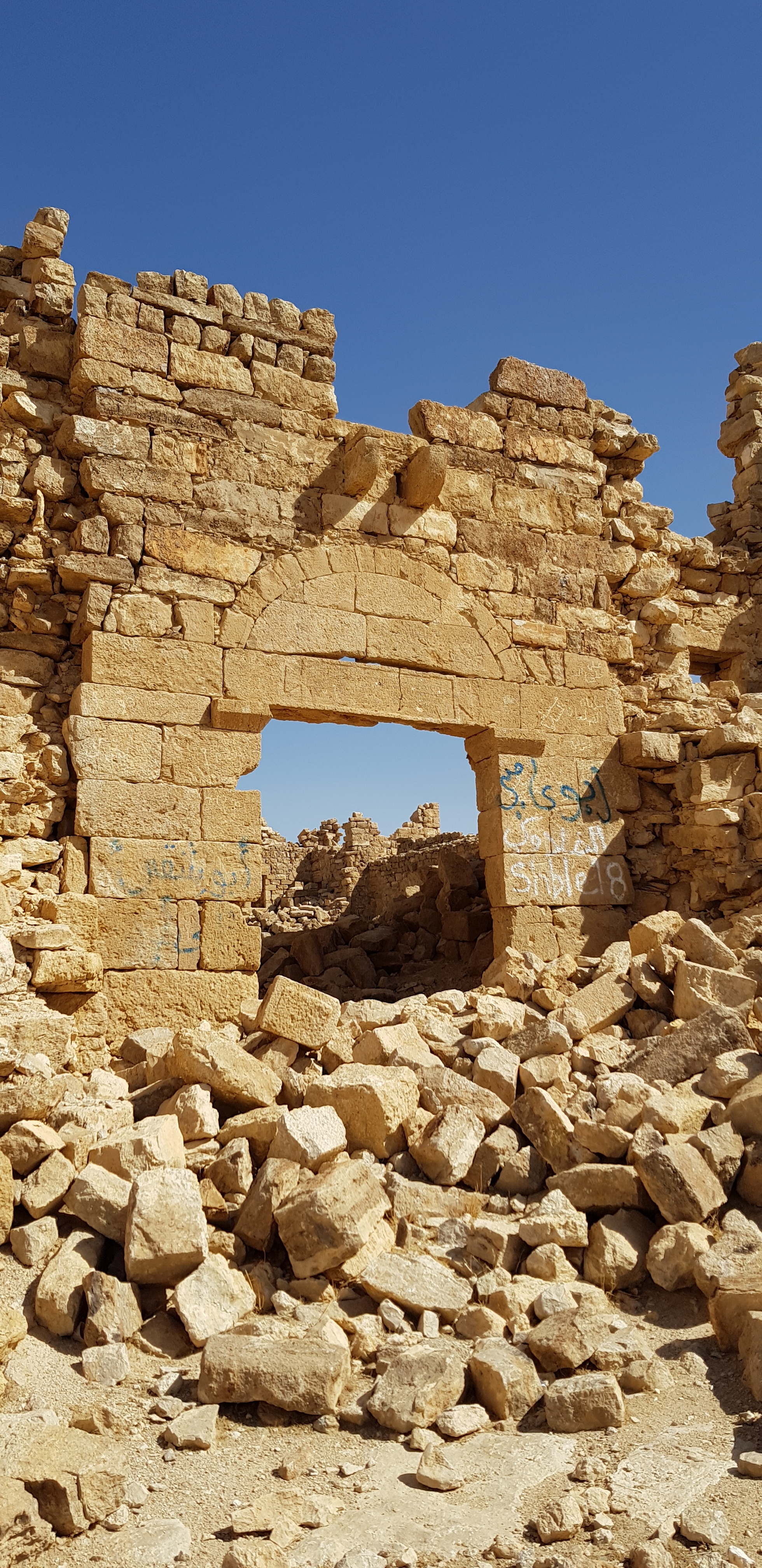 Qasr Bshir, main entrance.